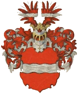 Polli suguvõsa aadlivapp